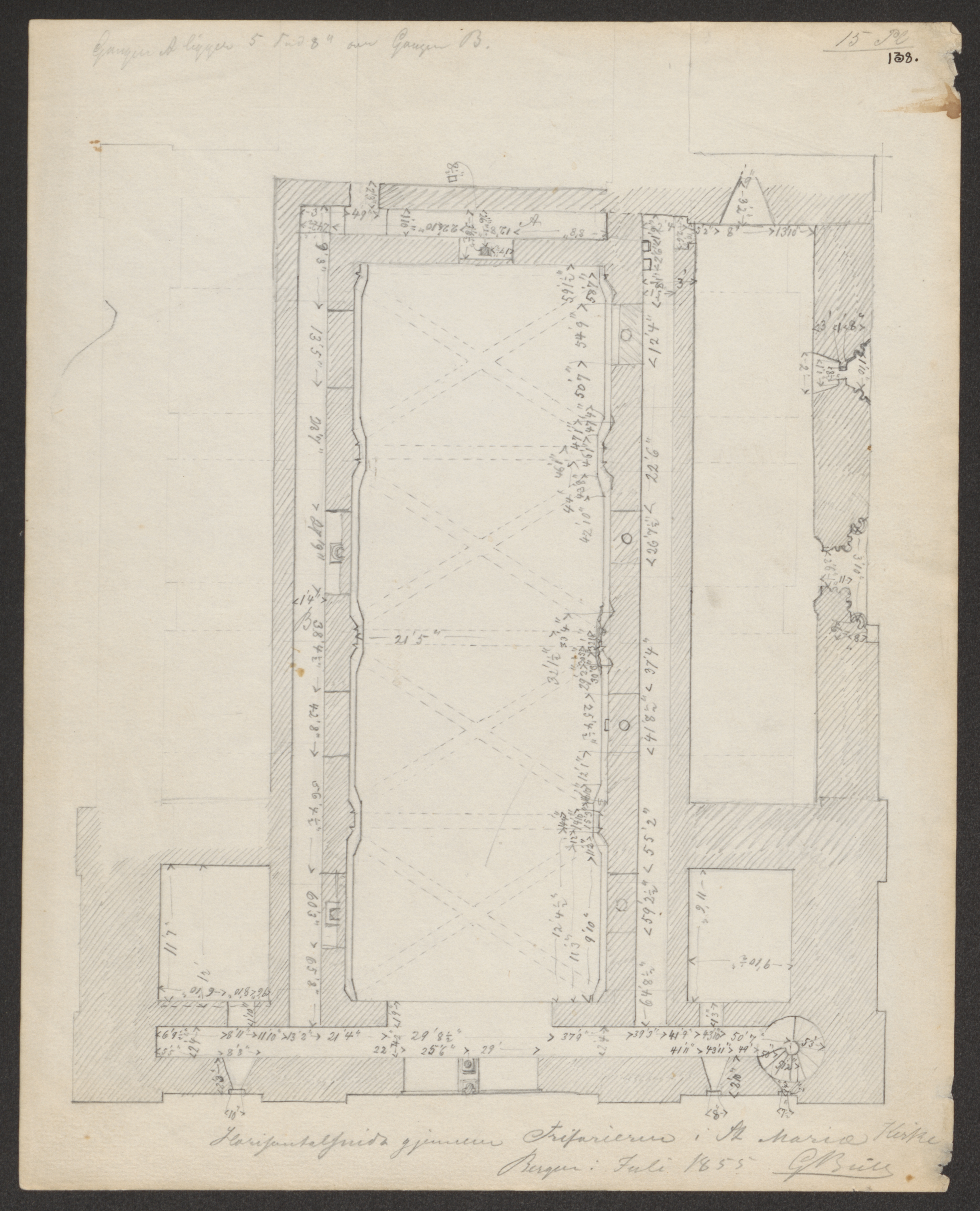 Bildet er hentet fra Riksantikvaren. 15 blad nummerert fra 135 til 149 Eier : Fortidsminneforeningen Sted : Norway, Hordaland, Bergen Emneord: "MIDDELALDER, STEINKIRKER" Medium : Blyant